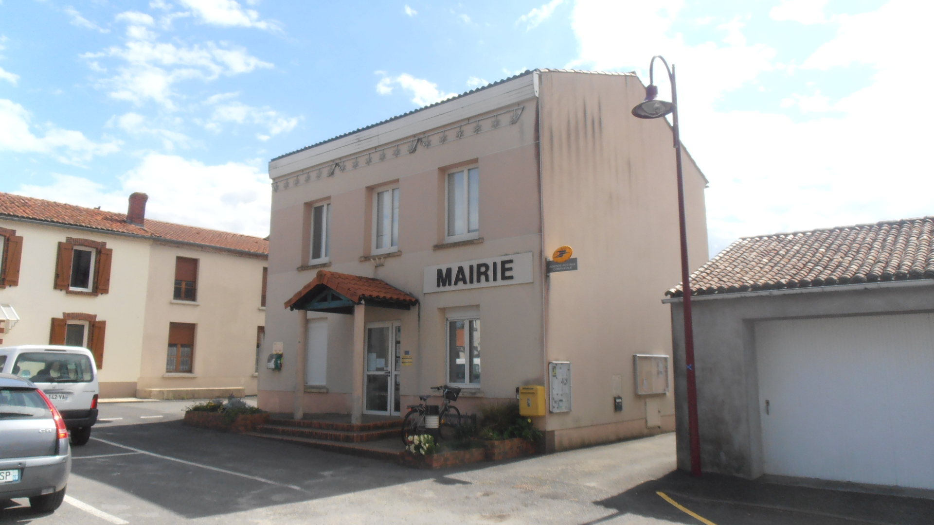 La mairie de La Salle-et-Chapelle-Aubry (Maine-et-Loire, France).